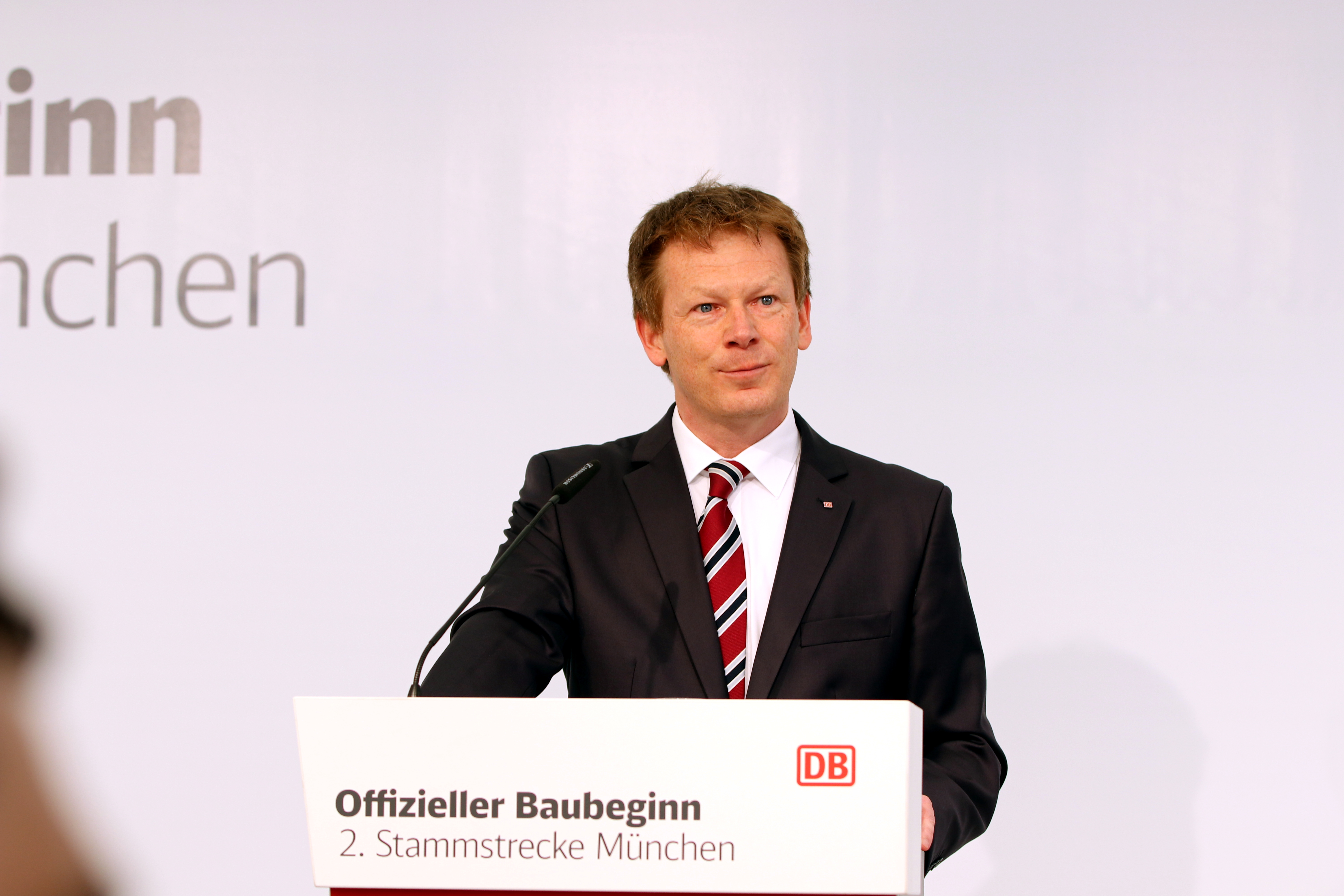 Richard Lutz, CEO der Deutschen Bahn AG beim 1. Spatenstich zur 2.-S-Bahn-Stammstrecke in München